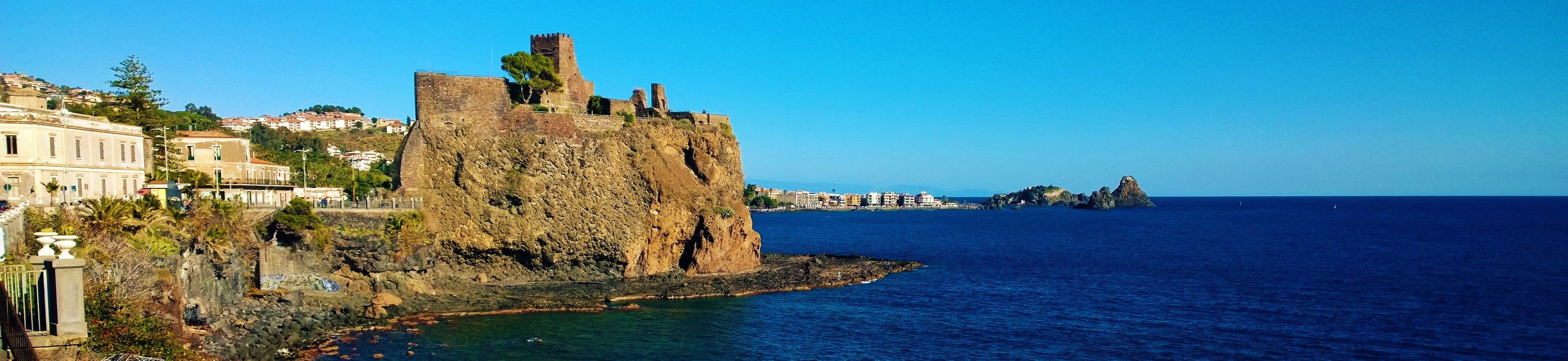 Il Castello di Aci